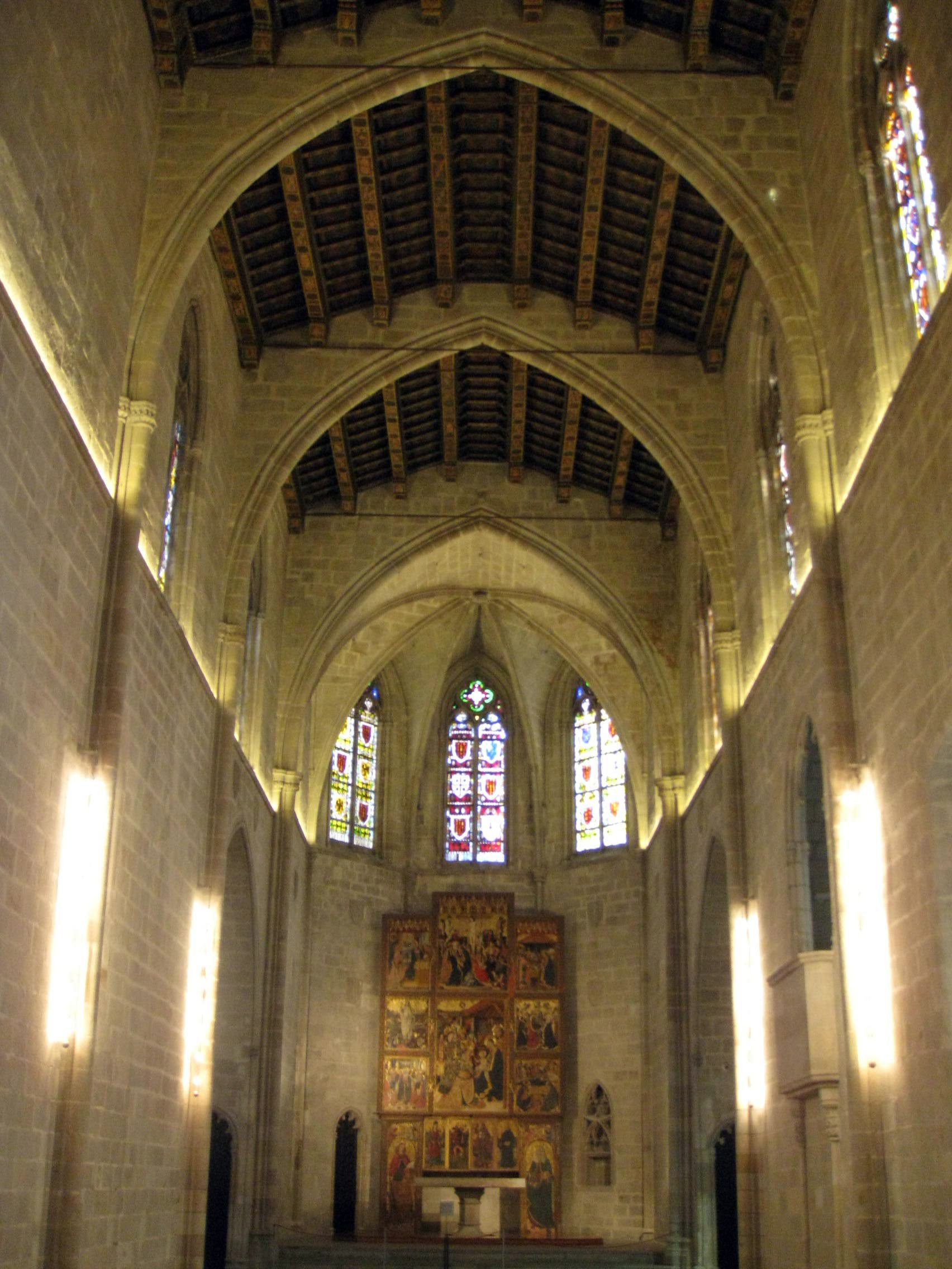 Capella Reial de Santa Àgata (Barcelona)